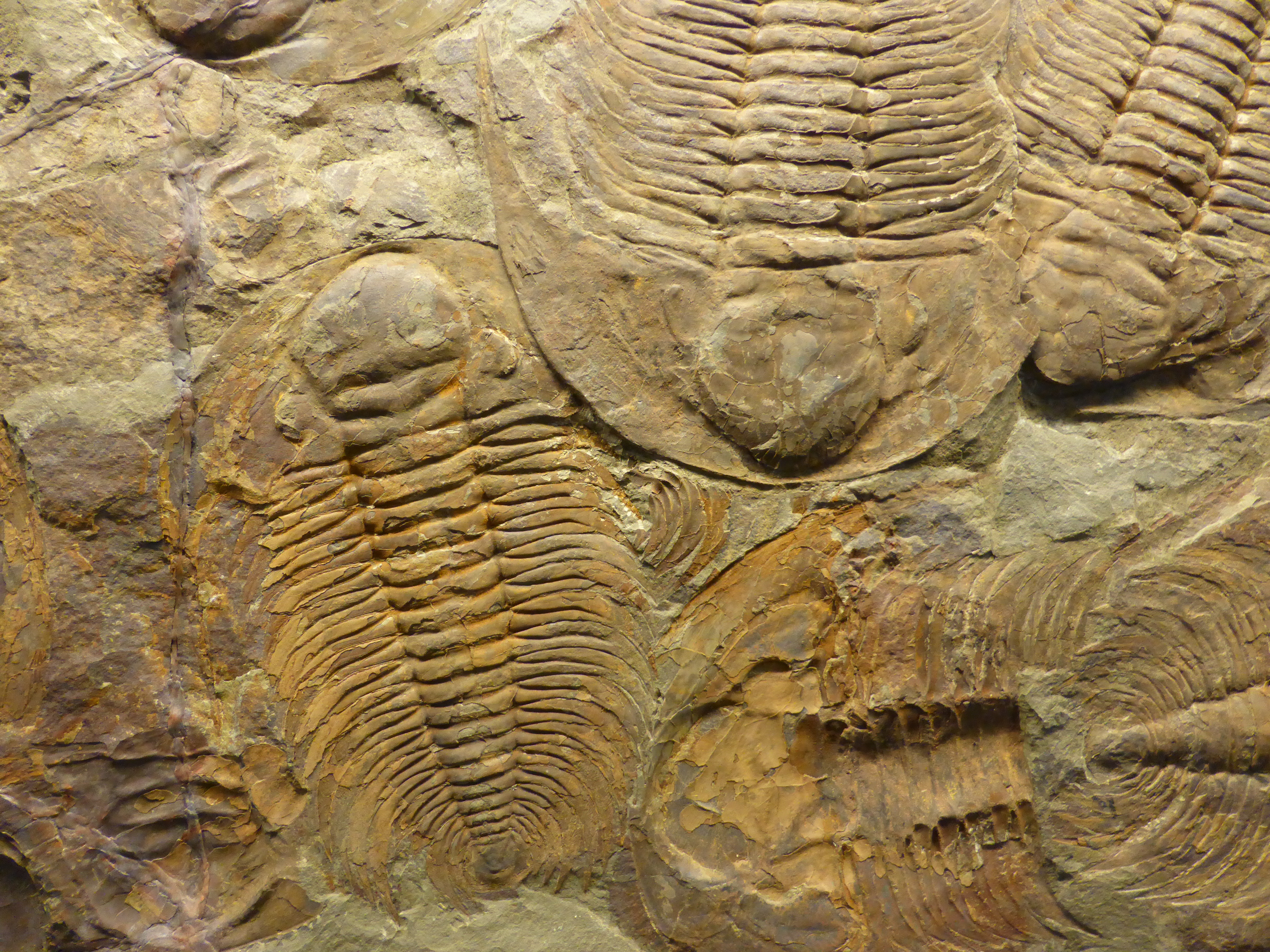 Trilobites de la especie Acadoparadoxides, provenientes de Alnif (Marruecos), al sur del macizo del Atlas, cerca del desierto del Sáhara. Pieza exhibida en la primera sala del Museo de Colchagua, ciudad de Santa Cruz, de la Provincia de Colchagua, en la Región del Libertador General Bernardo O'Higgins, en Chile.